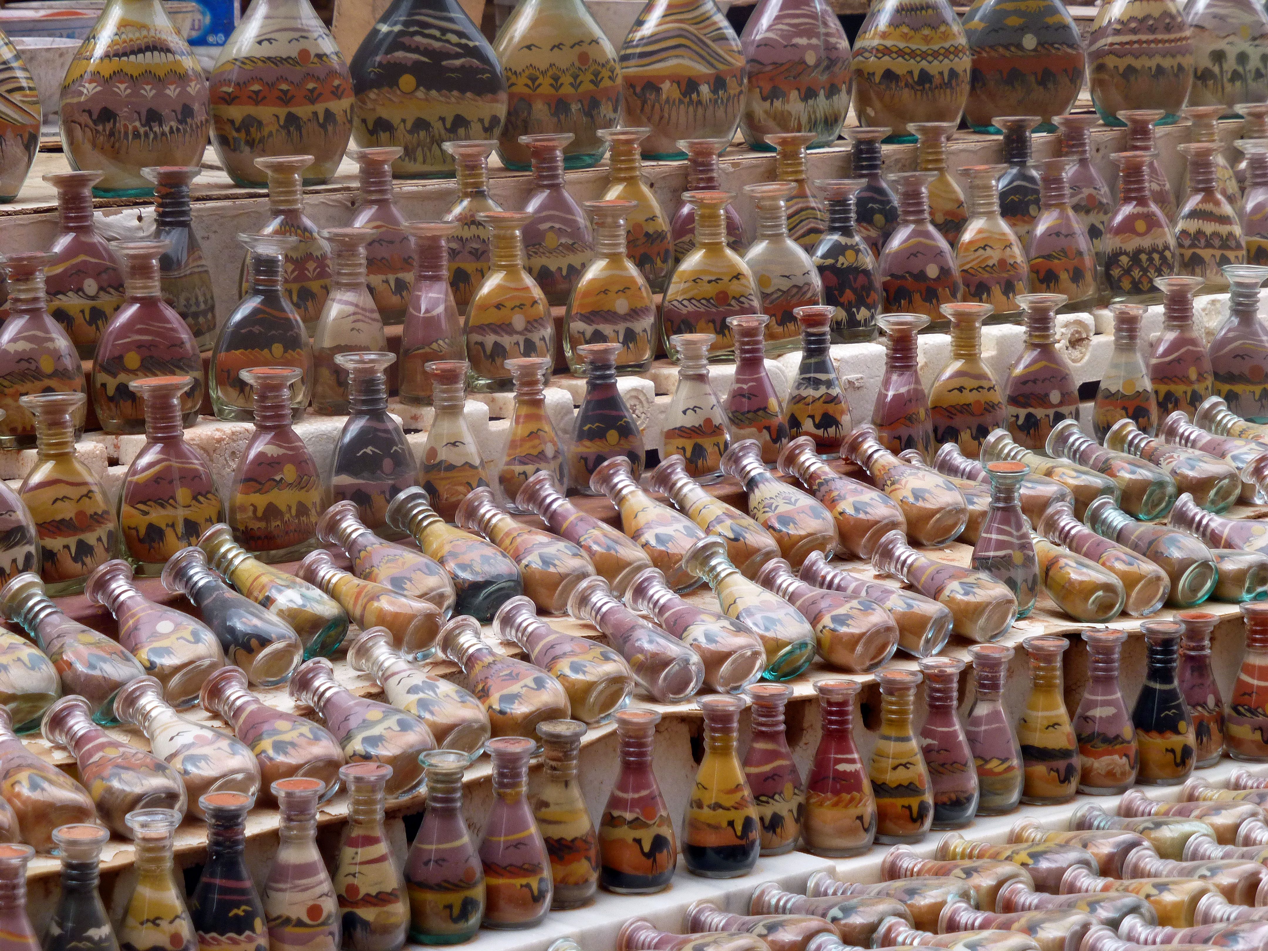 Bouteilles de sables colorés vendus aux touristes en Jordanie, ici à Pétra.